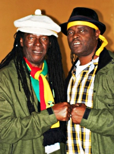 Sugar Minott & Winston Jarrett